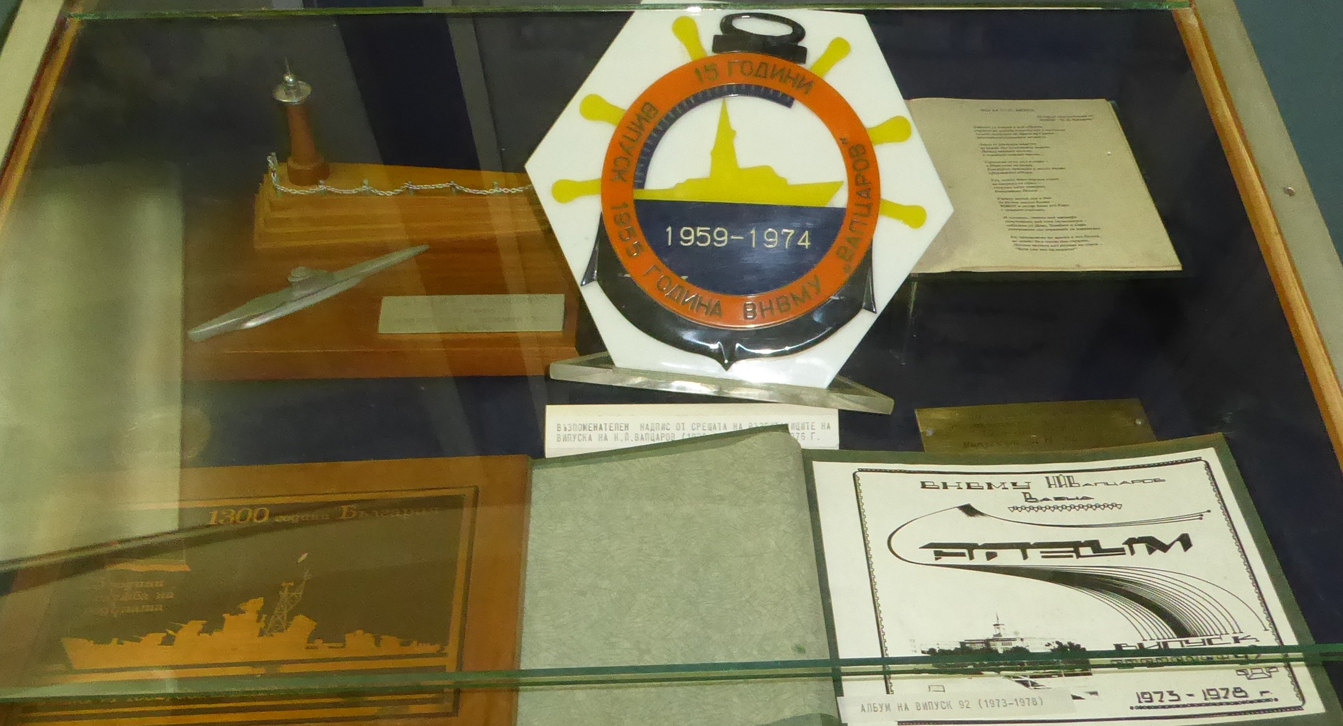 Marineakademie Warna-Alumni